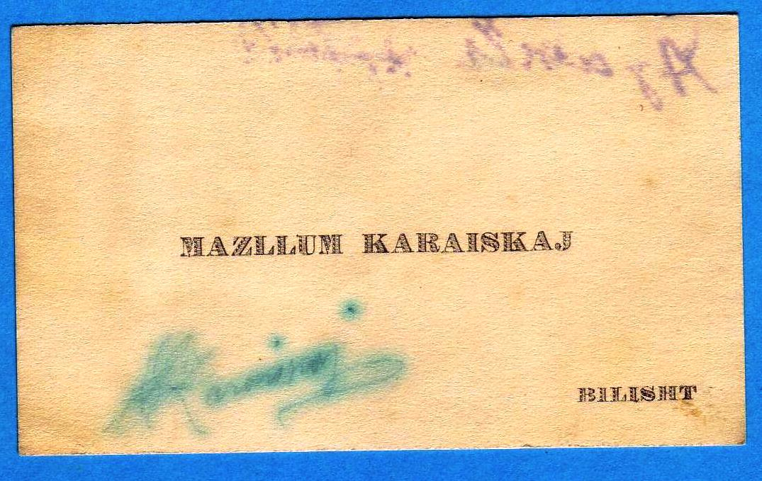 Η επισκεπτήρια κάρτα του ΜΑΖΛΟΥΜ ΚΑΡΑϊΣΚΑΚ με την οποία πληροφόρησε τον παπα-Σταύρο Τσάμη για το δρομολόγιο του Κασήμ αγά